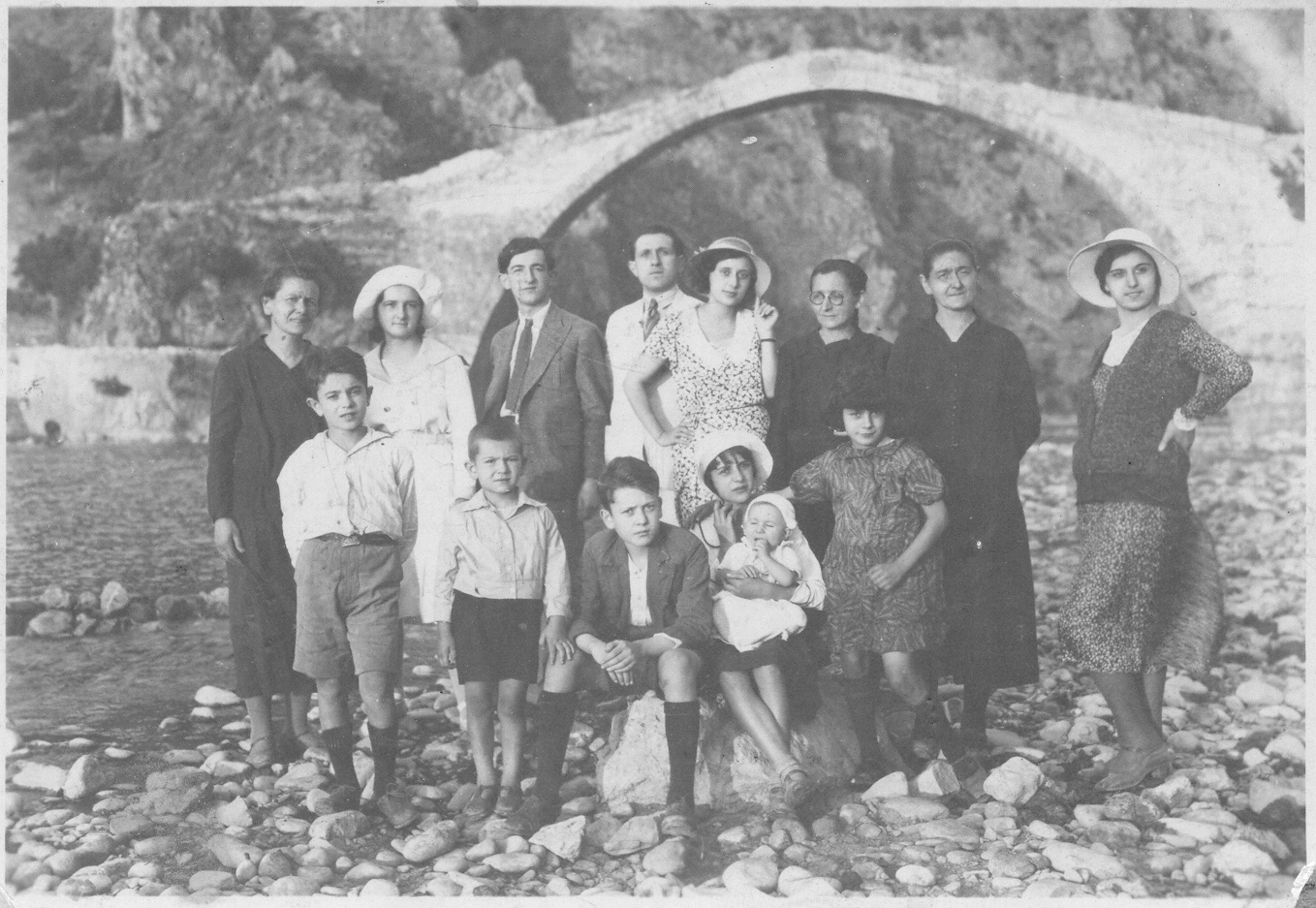 Στη γέφυρα του Αώου στην Κόνιτσα το 1933. Ο Γιάννης Λυμπερόπουλος (πρώτος σπό αριστερά στην μπροστινή σειρά) σε ηλικία 12 χρονών με συγγενείς. Πίσω αριστερά του, η μητέρα του Λέγκω (Ελένη).